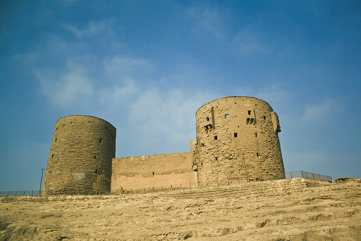 Каир крепость цитадель Kair Fortress Citadel